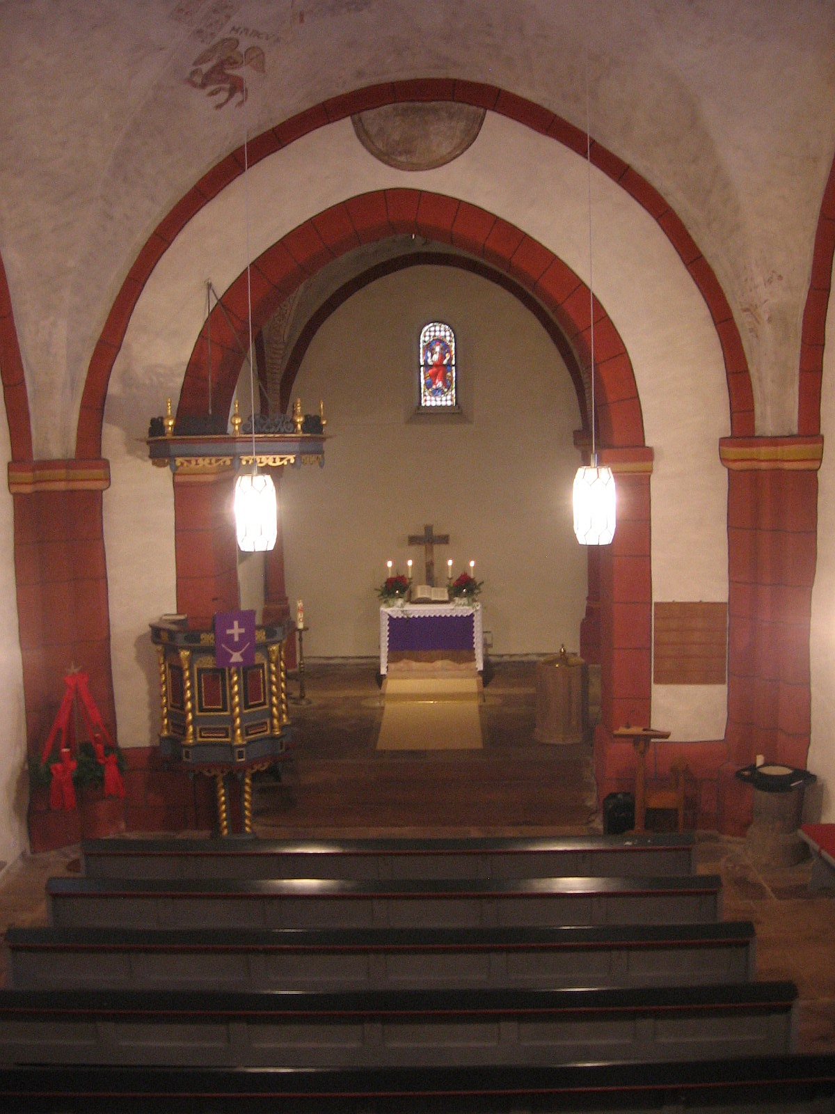 Innenansicht der Martinskirche in Michelbach